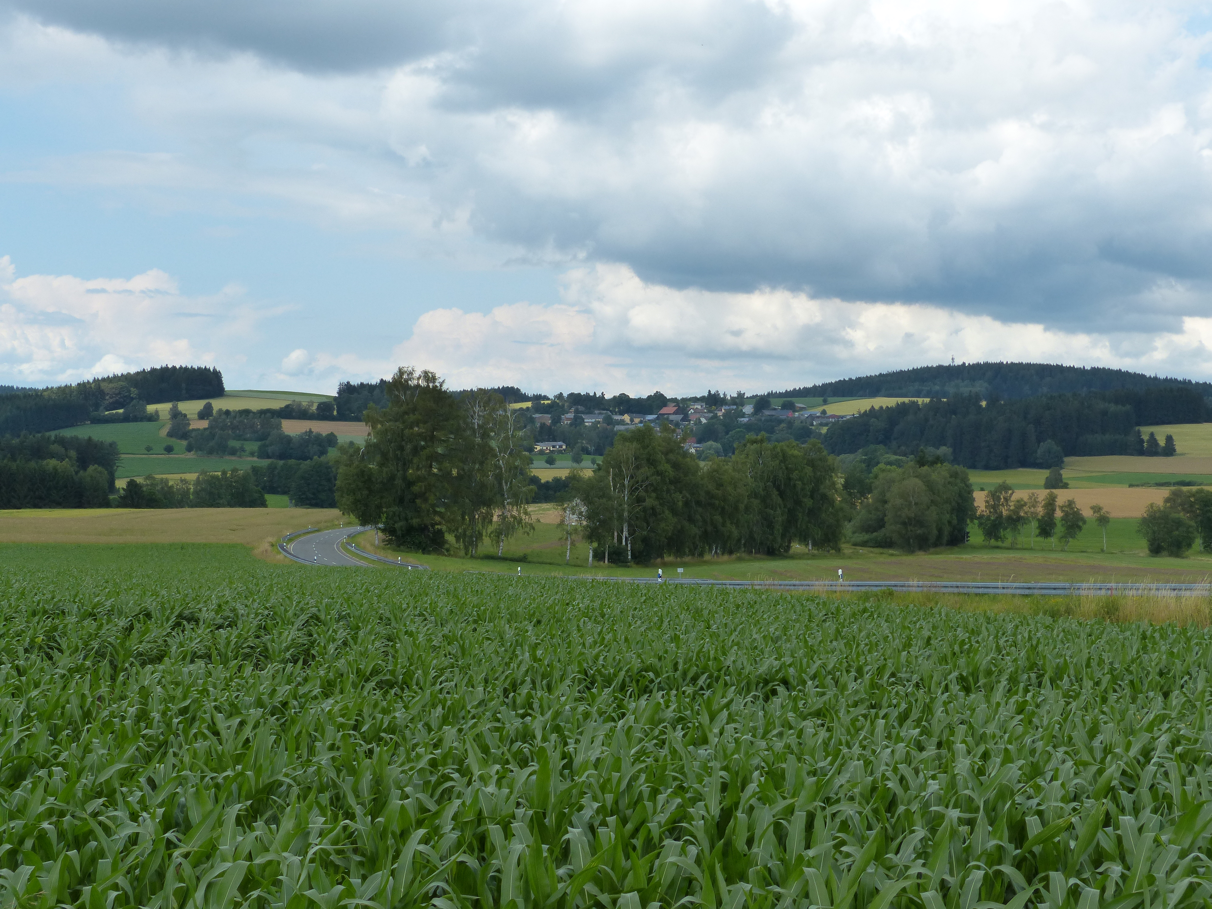 Ortsansicht von Förstenreuth